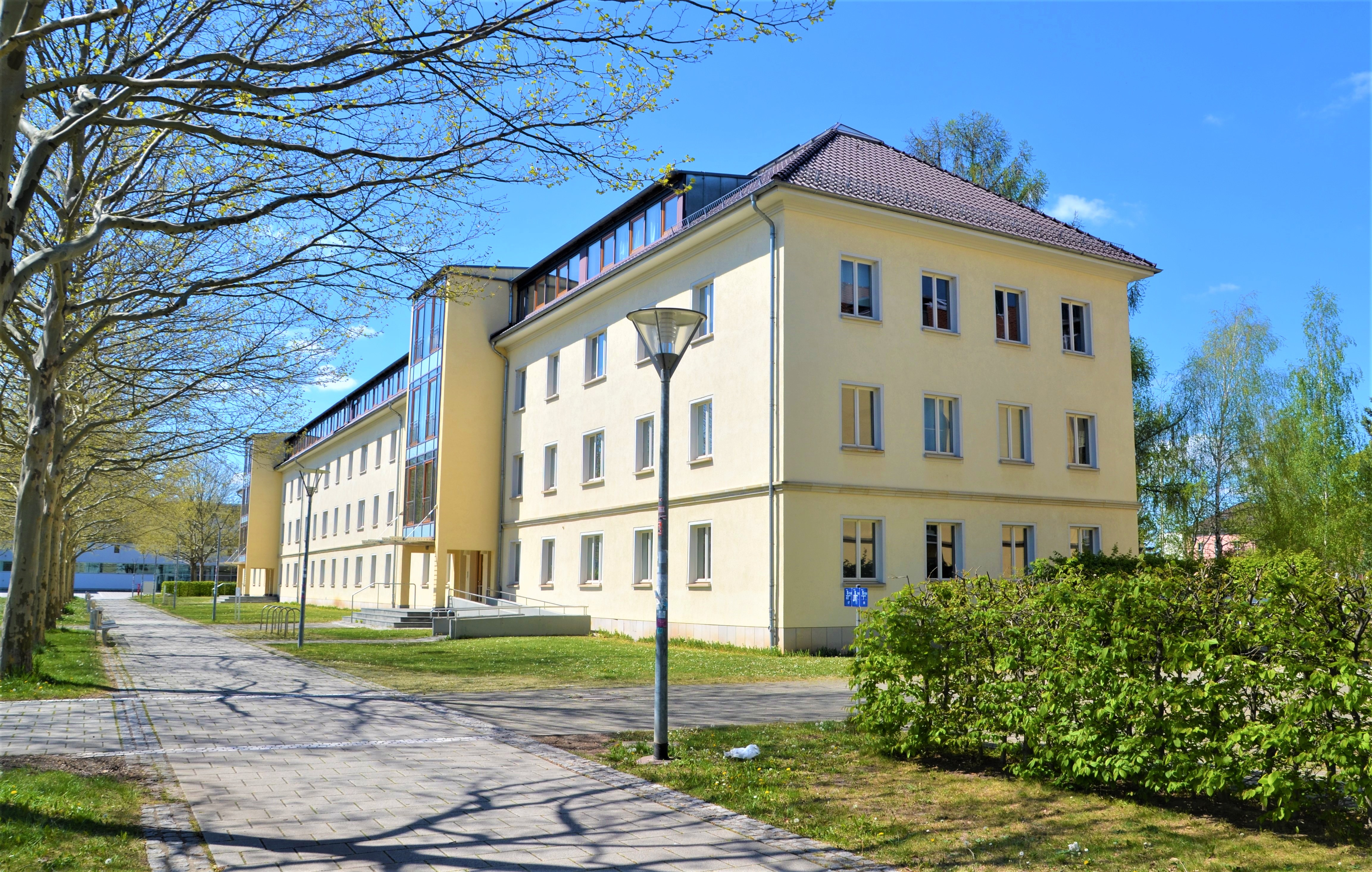 Lehrgebäude 4 der Universität Erfurt (Philosophische Fakultät) entlang der Max-Weber-Allee